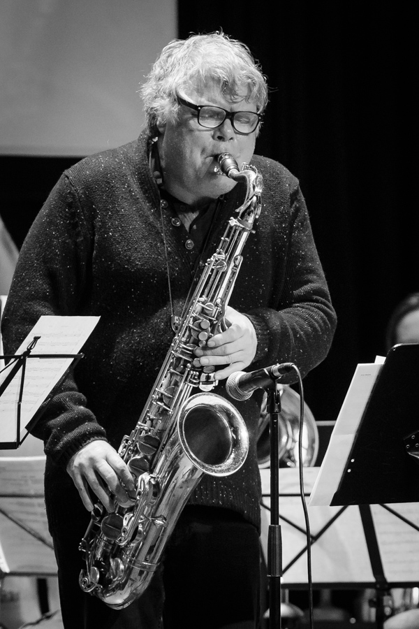 Avbilda : Vidar JohansenArrangement: Borderline Big BandHøve, arrangør eller stad : Vinterjazz 2016, Torshov